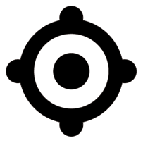 京都市立日章小学校の校章